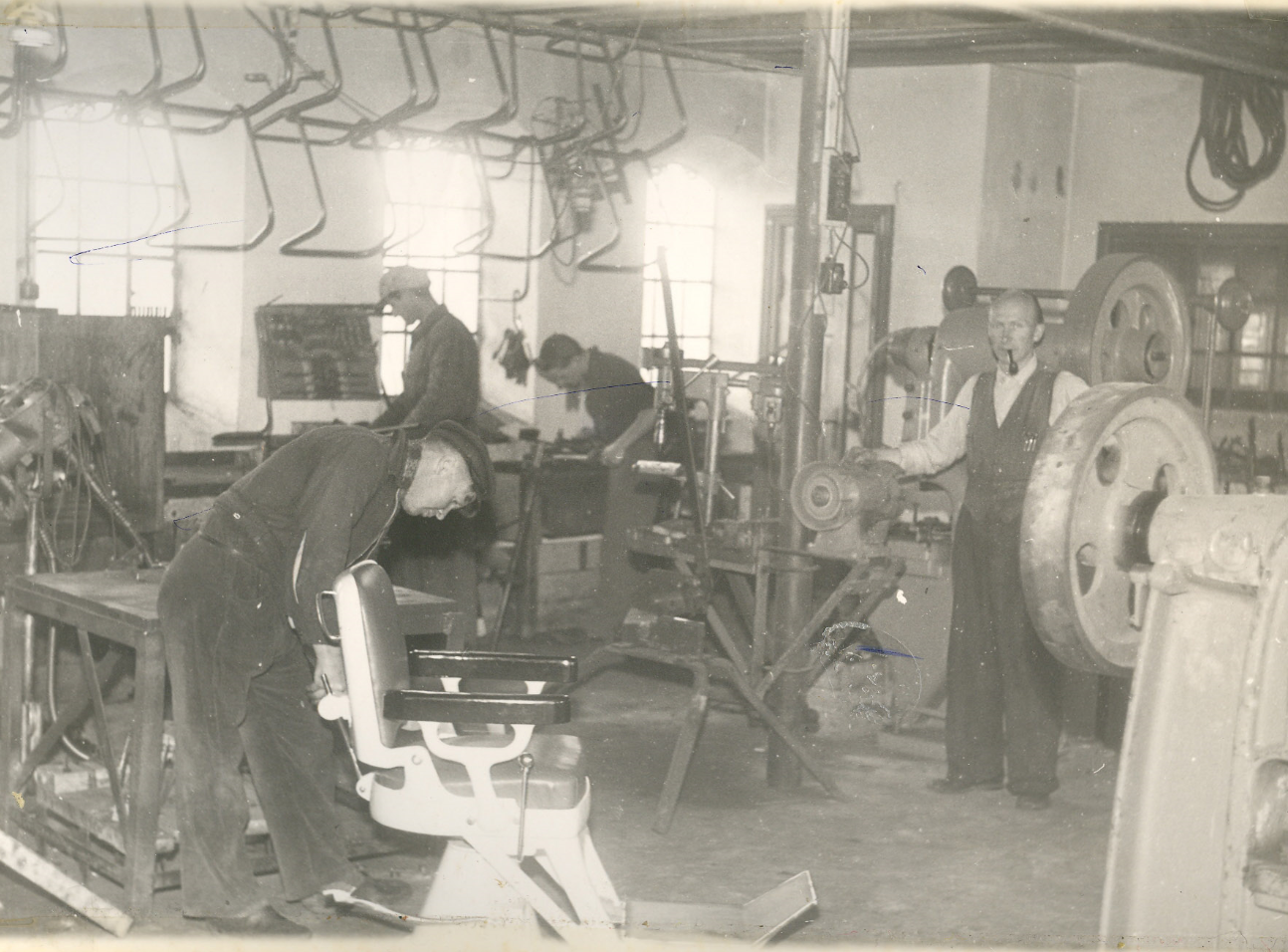 Billede fra produktionen i 1946